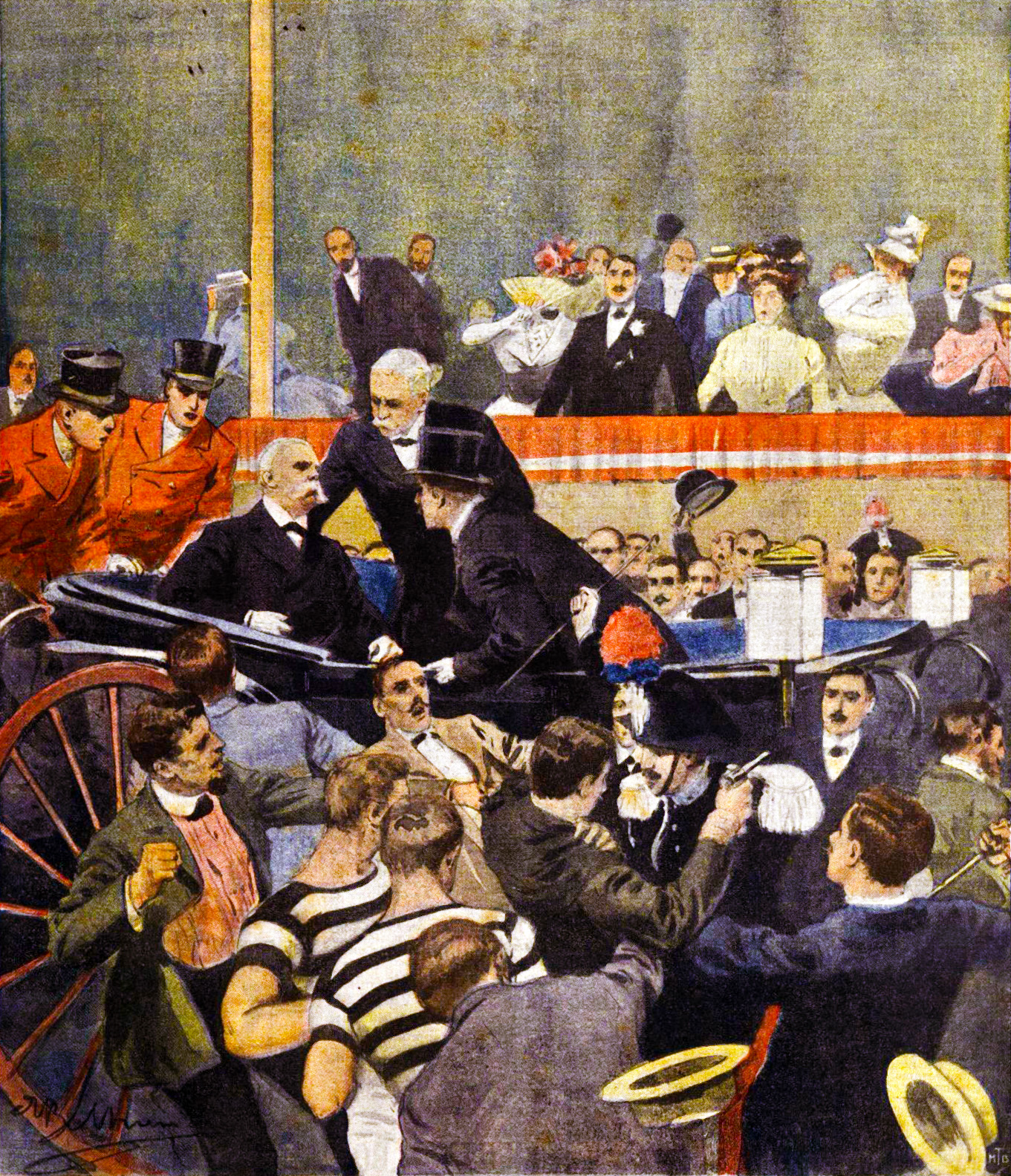 Gaetano Bresci assassina Umberto I d'Italia